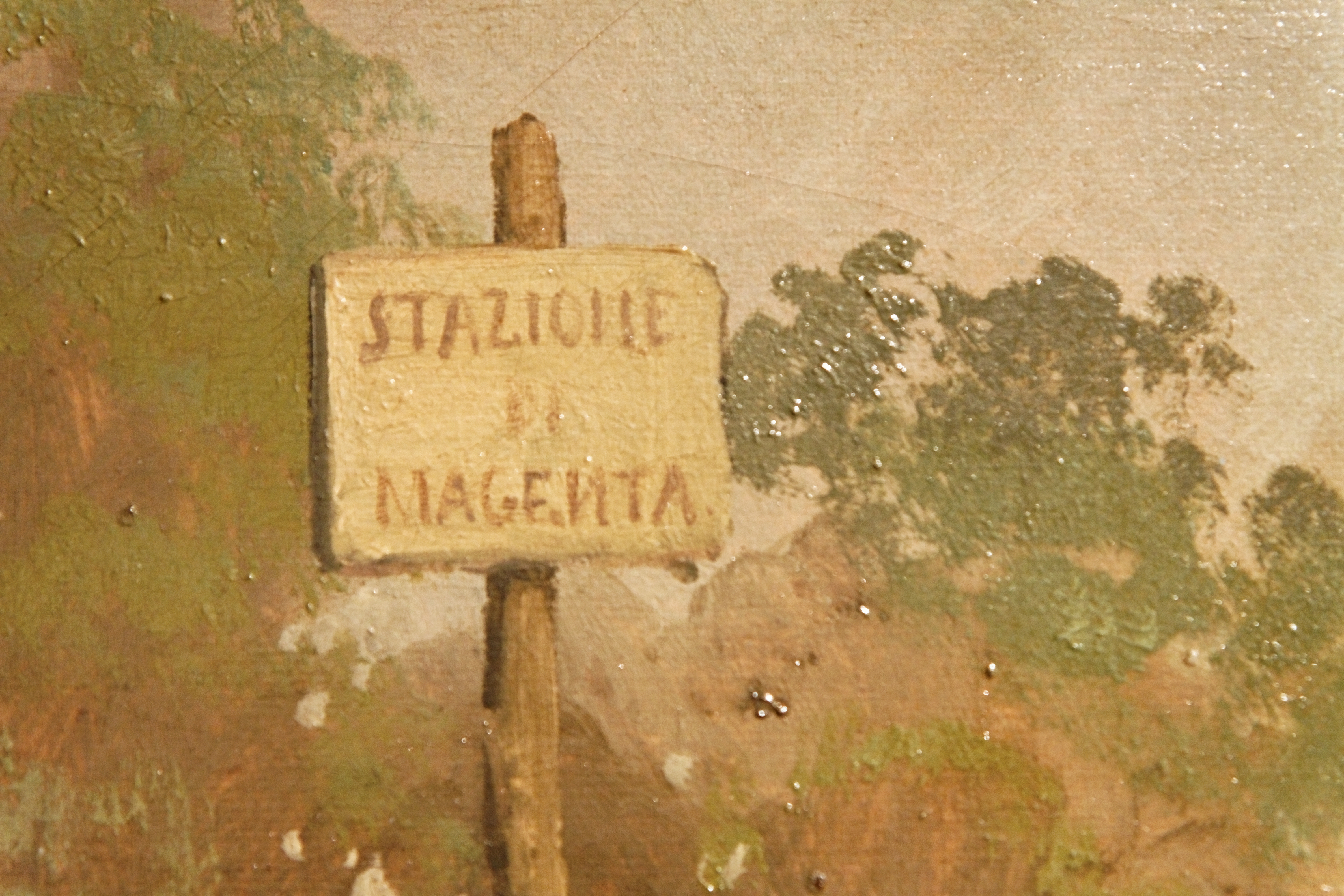 LA bataille de Magenta par Gerolamo Induno.